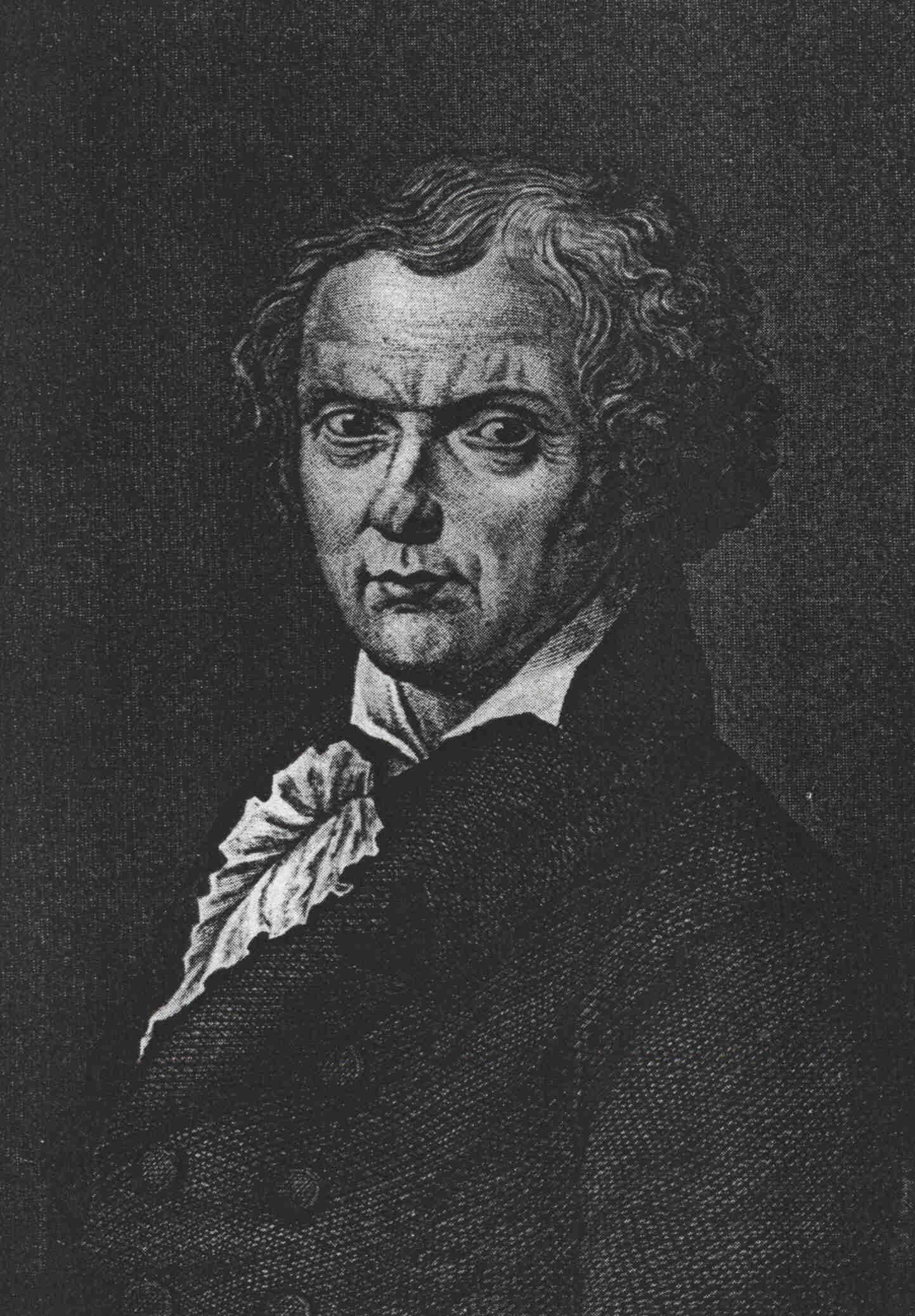 Alois Wilhelm Schreiber (1761-1841), badischer Hofhistoriograph